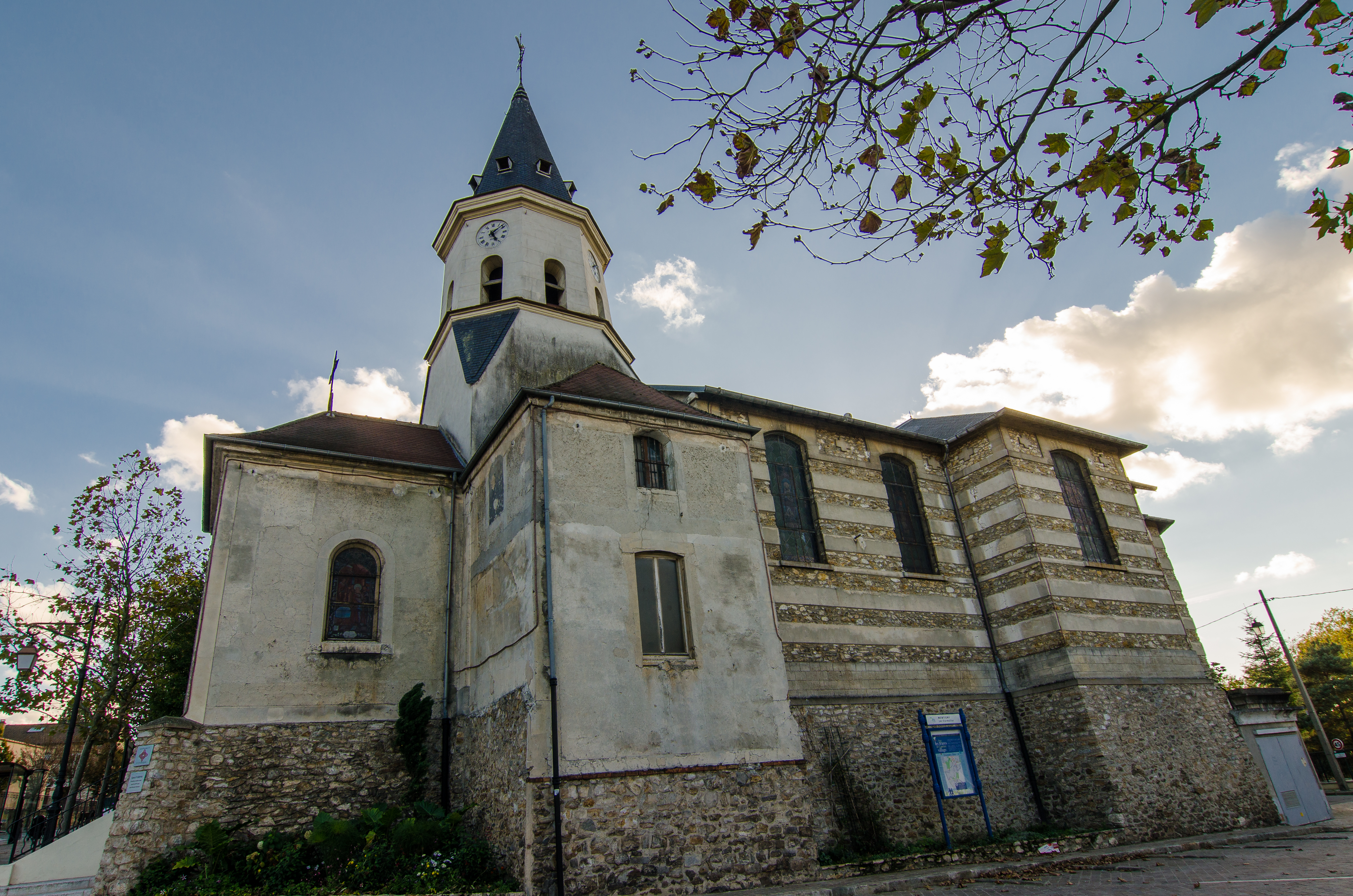 église de Montigny lès Cormeilles